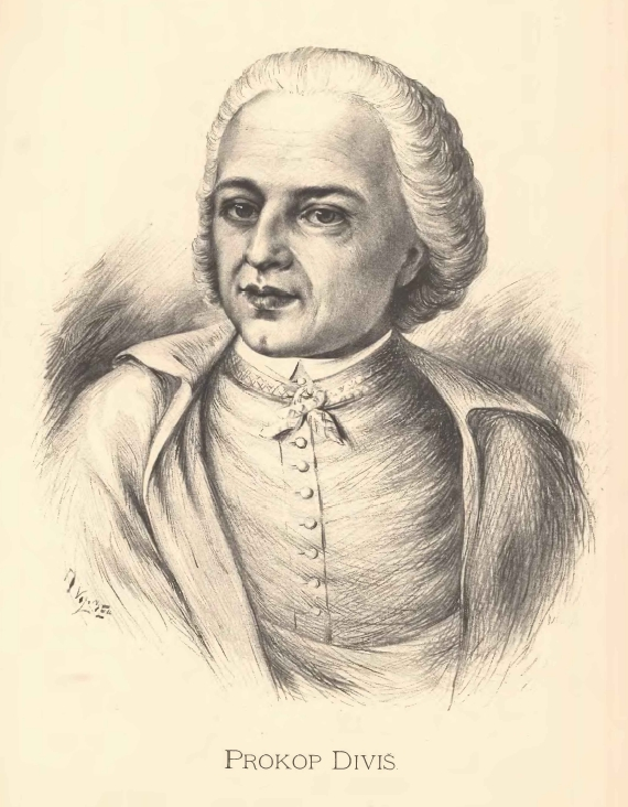 Portréty předních osobností od Jana Vilímka